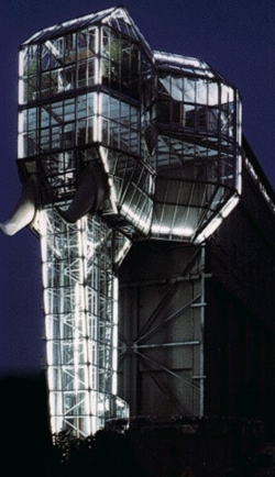 Glaselefant von Horst Rellecke im Maximilianpark Hamm, Nachtaufnahme